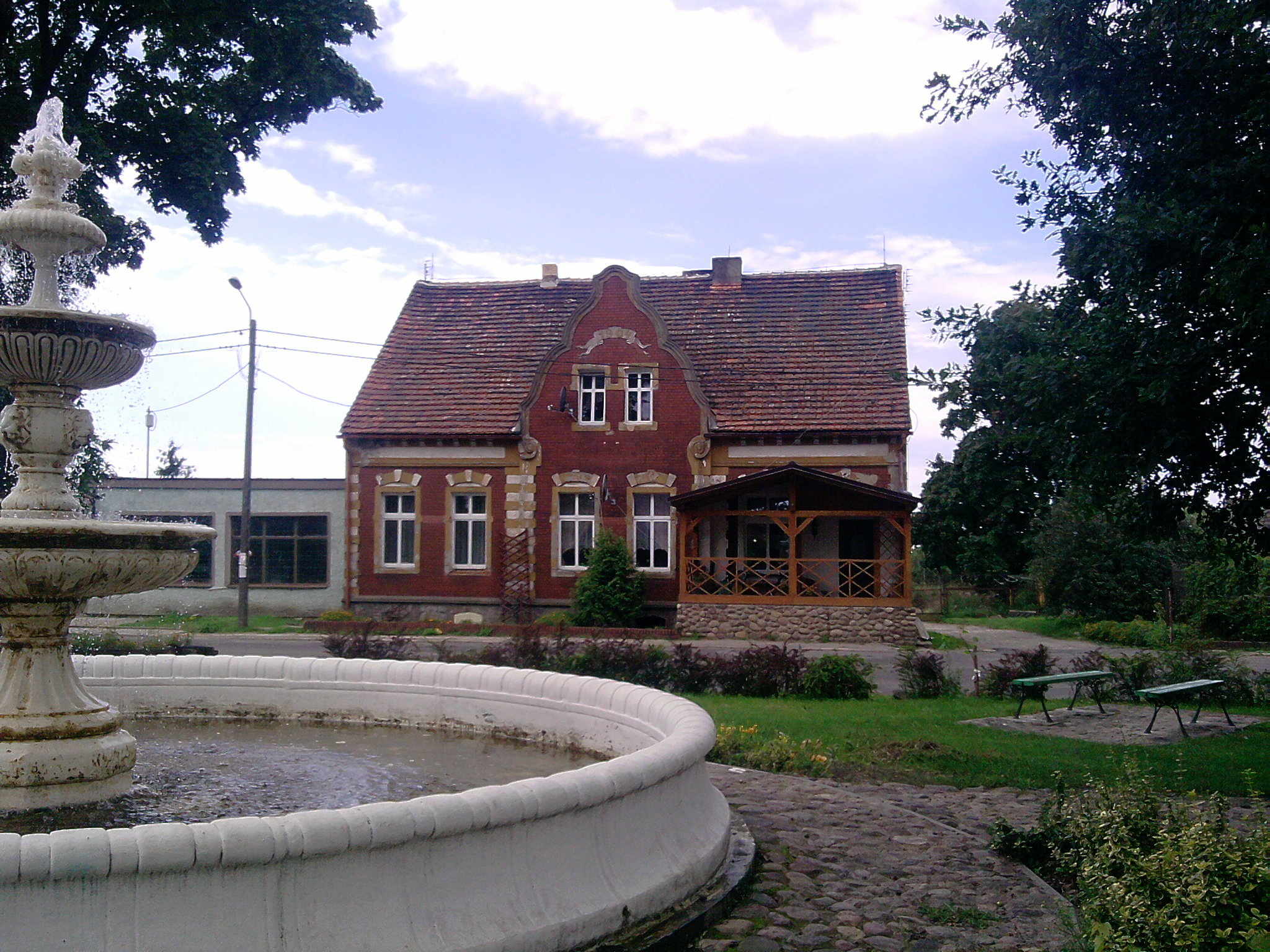 Jeden z najstarszych budynków w Kowalowie